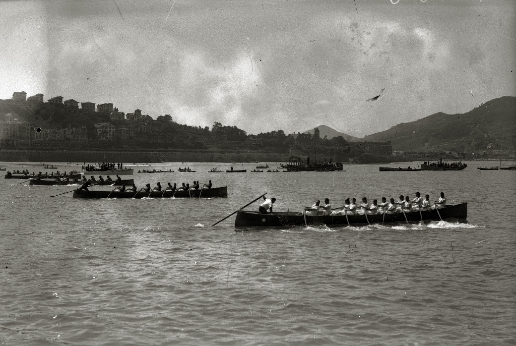 Título original: Celebración de las regatas de la Concha (6/12) Localización: San Sebastián (Guipúzcoa)